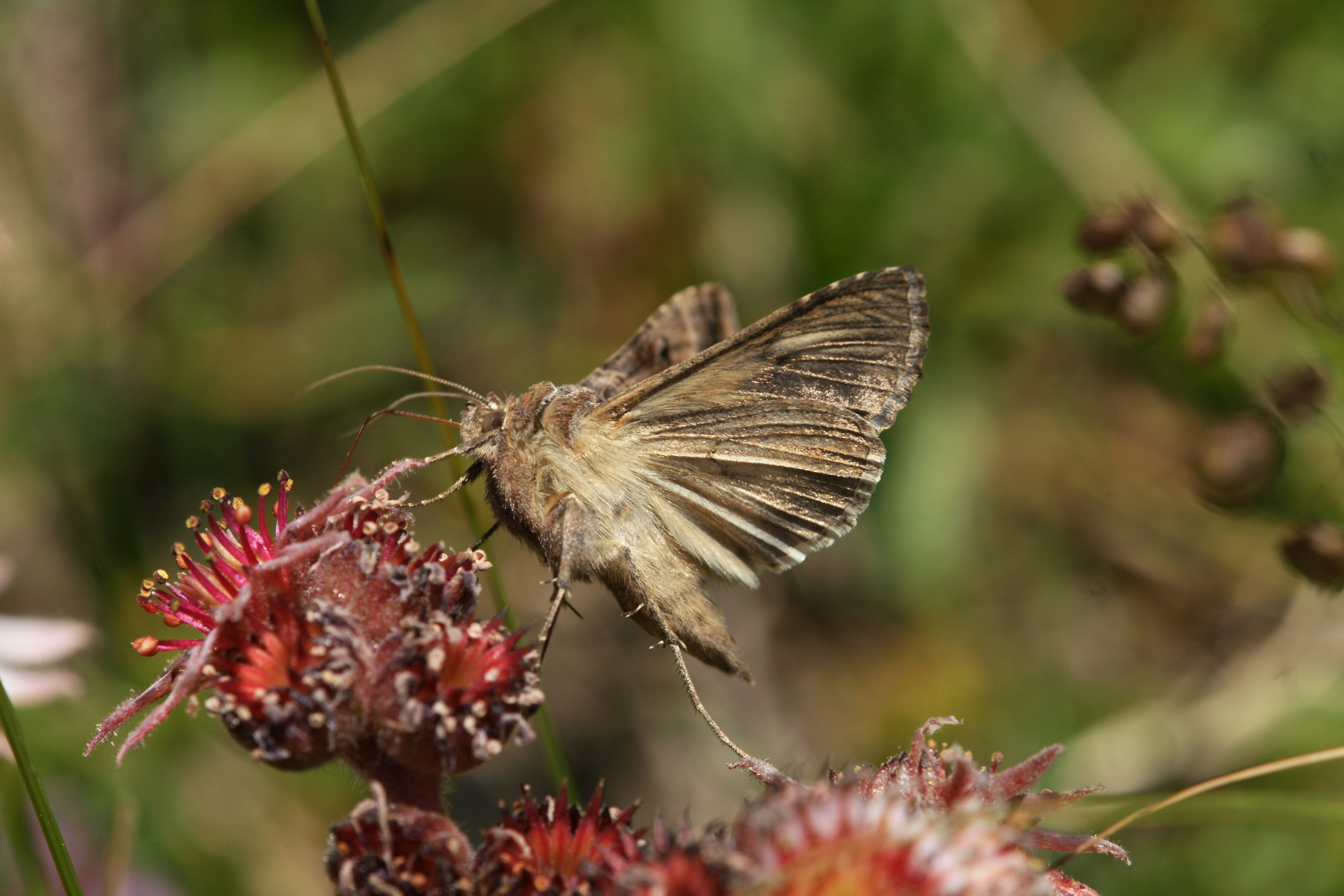 Sempervivum